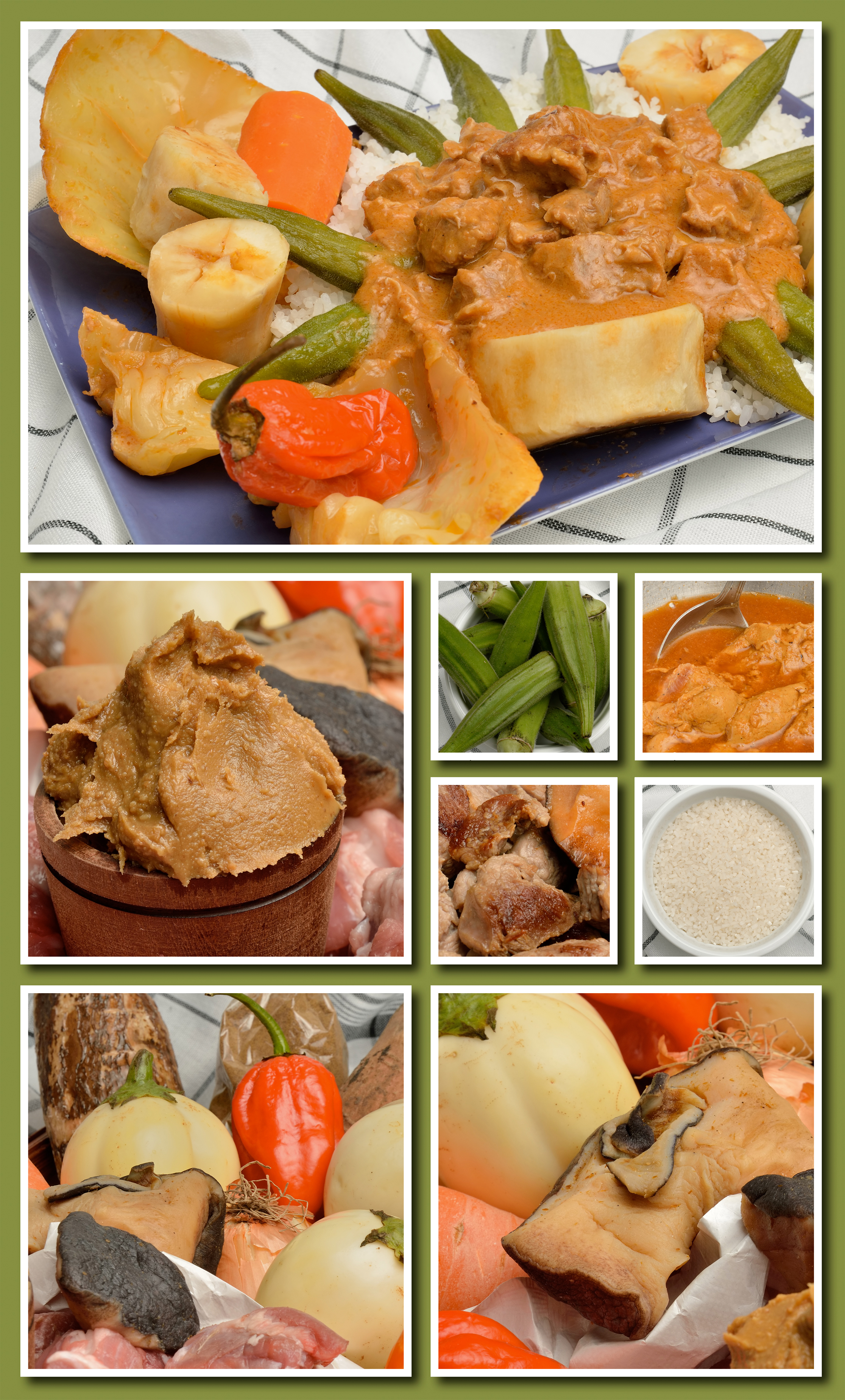 Mafé Sénégalais avec le yet et le nététou.Les gombos sont décoratifs, n'est ce pas ;) This is an image of food from Senegal